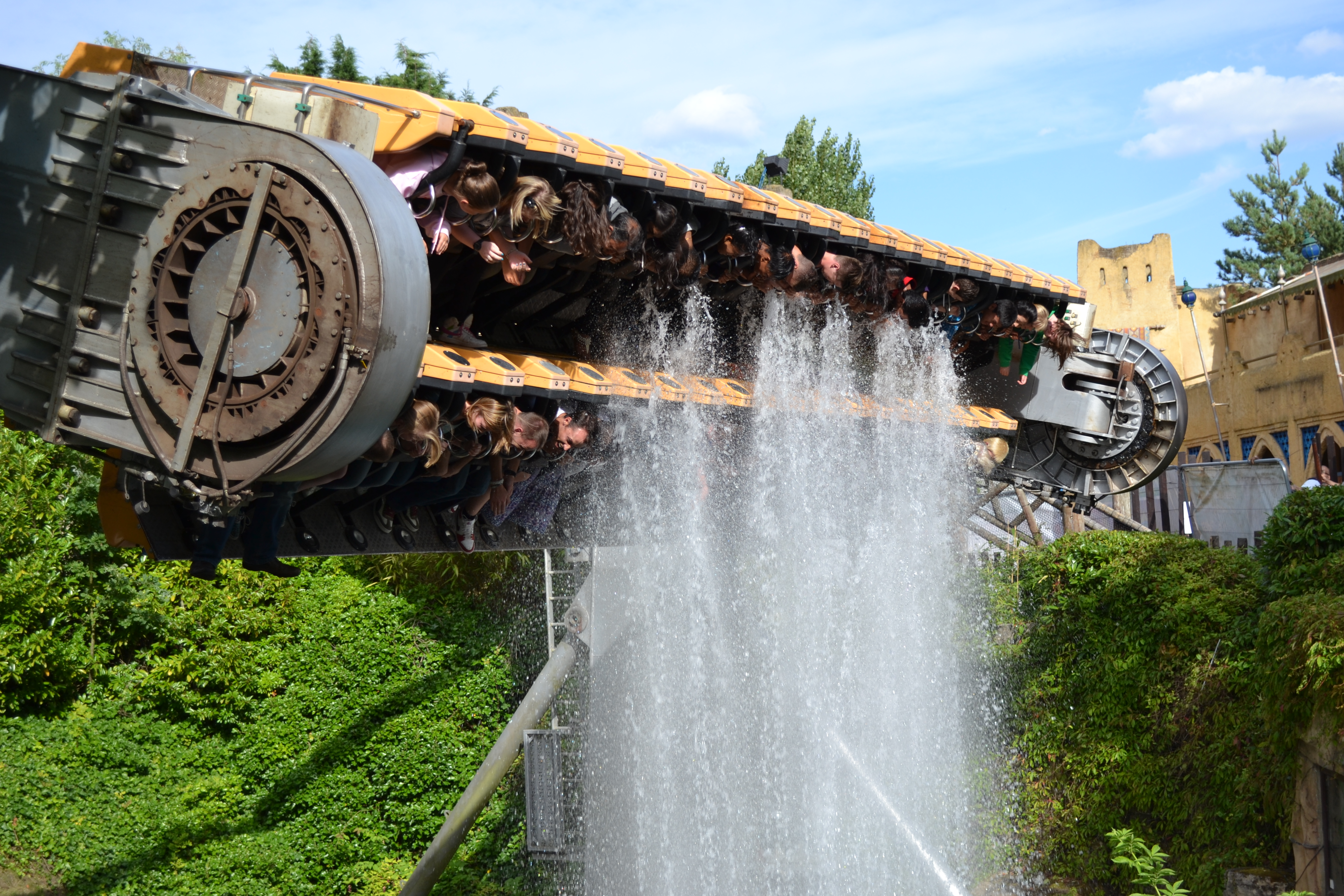 Rameses Revenge water element